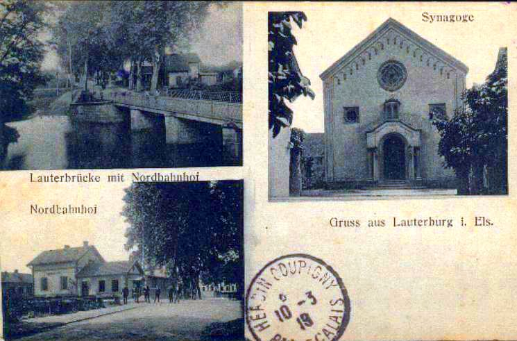 Ansichtskarte von Lauterbourg im Elsass